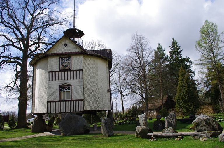 Adomo Petrausko muziejus